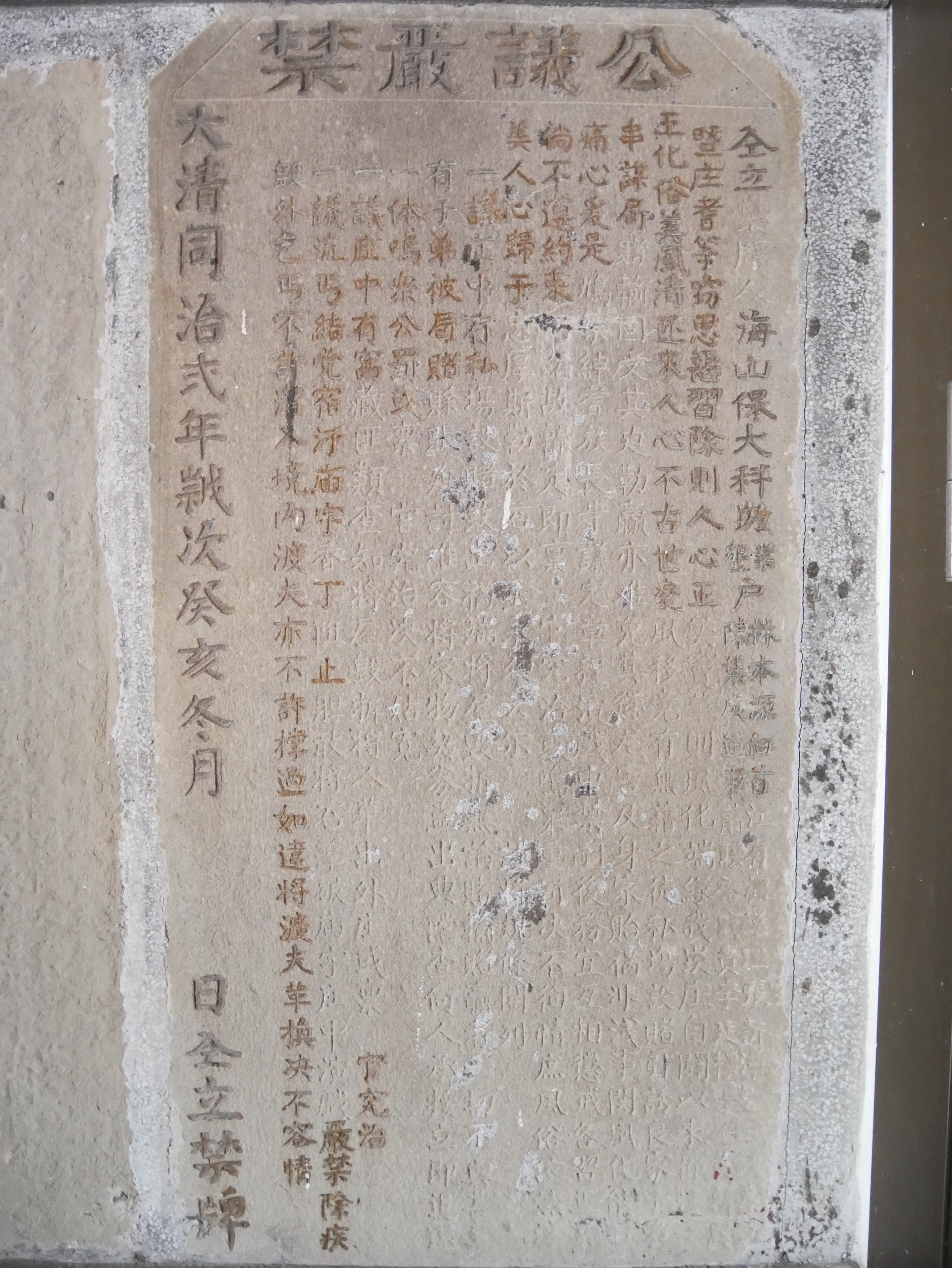 中文（台灣）: 公議嚴禁惡習碑記（大清同治弍年歲次癸亥冬月），桃園市大溪區福仁里 碑文 仝立禁牌人海山保大科崁業林本源、墾（戶）陳集成、佃首江有源、通事蕭聯裕、總理張新潭、職員李廷標、監生鍾善敏、黃新興、暨庄耆等。 窃思惡習除則人心正，弊竇革則風化端。緣我崁庄自闢以來，仰沐王化，俗美風清。□來人心不古，世變風移，竟有無藉之徒私場設賭，引誘良家子弟、串謀局賭；輸固受其迫勒，贏亦難免其愆，尤害及身家，貽禍非淺。 事関風化，能不痛心！爰是鳩集紳耆、族長等，議定章程，演戲申禁。嗣後務宜互相懲戒、各習正業，倘不尊約束、仍蹈故轍，定即稟官究治，或嗚眾重罰，決不徇情！庶風俗依然淳美，人心歸于忠厚；斯勒於石，以垂永久。示□。 謹將規條開列： 一議：庄中有私場設賭致出禍端，將屋毀拆，無論賭輸賭贏者，一切不與。甚至有子弟被局賭賒賬、迫討難容，將家物、契券盜出典當，查何人承接立即追還，一体鳴眾公罰，或稟官究治，決不姑寬。 一議：庄中有窩藏匪類，查知，將屋毀拆、將人革出外庄，或稟官究治。 一議：流丐結党宿汙庙宇，香丁阻止，胆敢將石擊破庙宇，庄中演戲嚴禁。除疾、毀外，乞丐不許潛入境內，渡夫亦不許□過。如違，將渡夫革換，決不容情 大清同治弍年歲次癸亥冬月 日，仝立禁牌